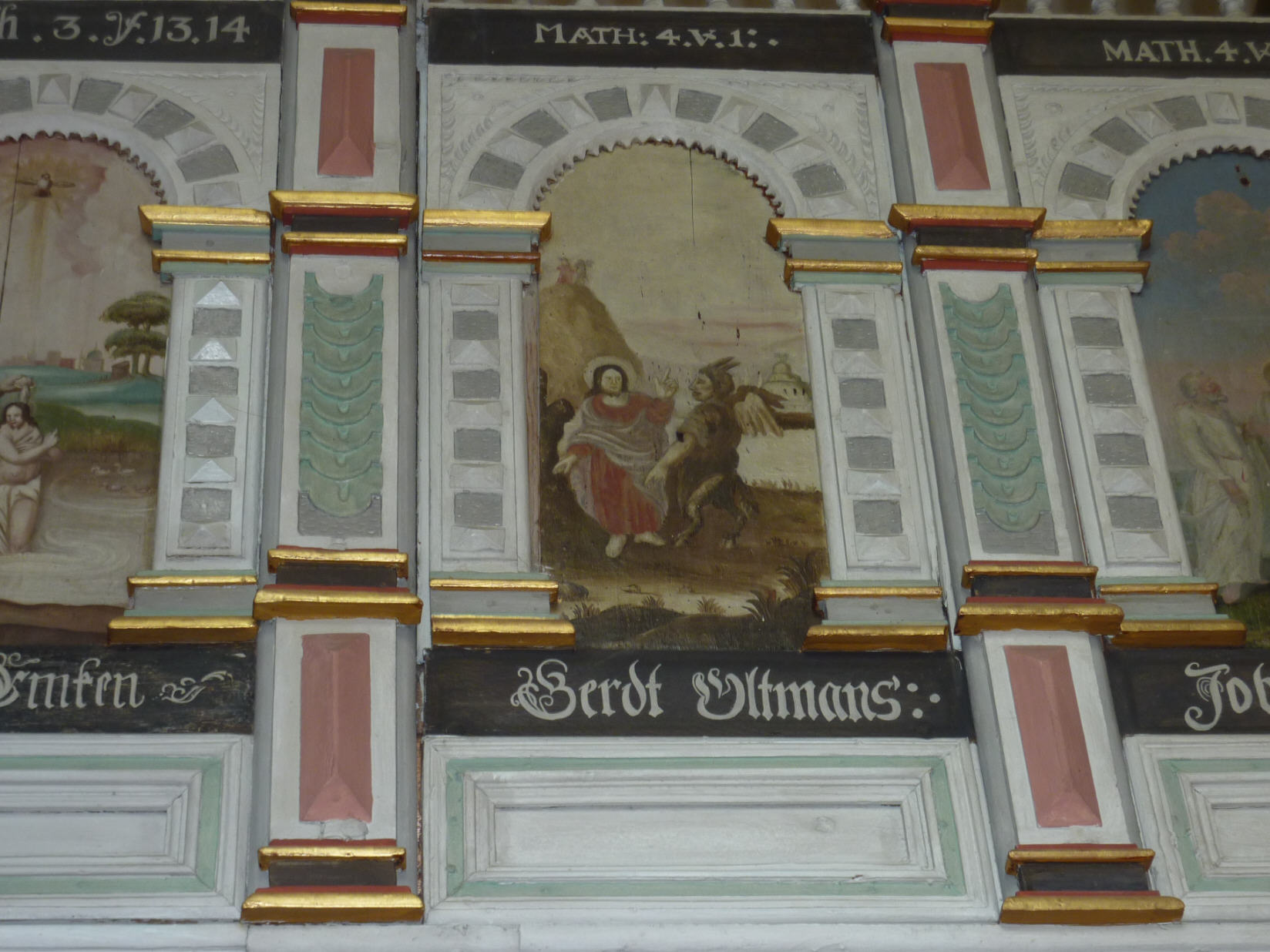 Emporenmalerei in St. Johannes, Bad Zwischenahn